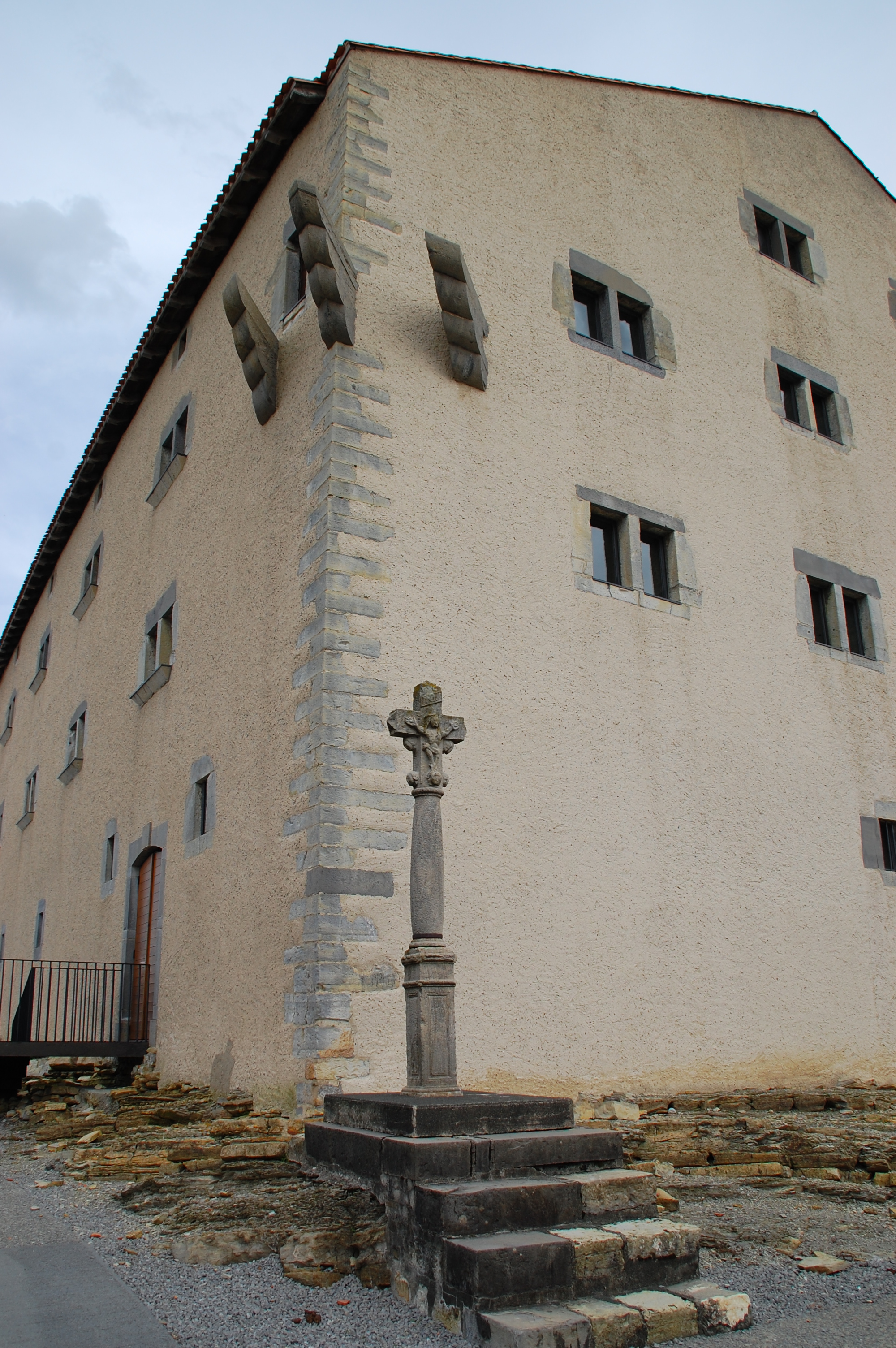 Croix de chemin.